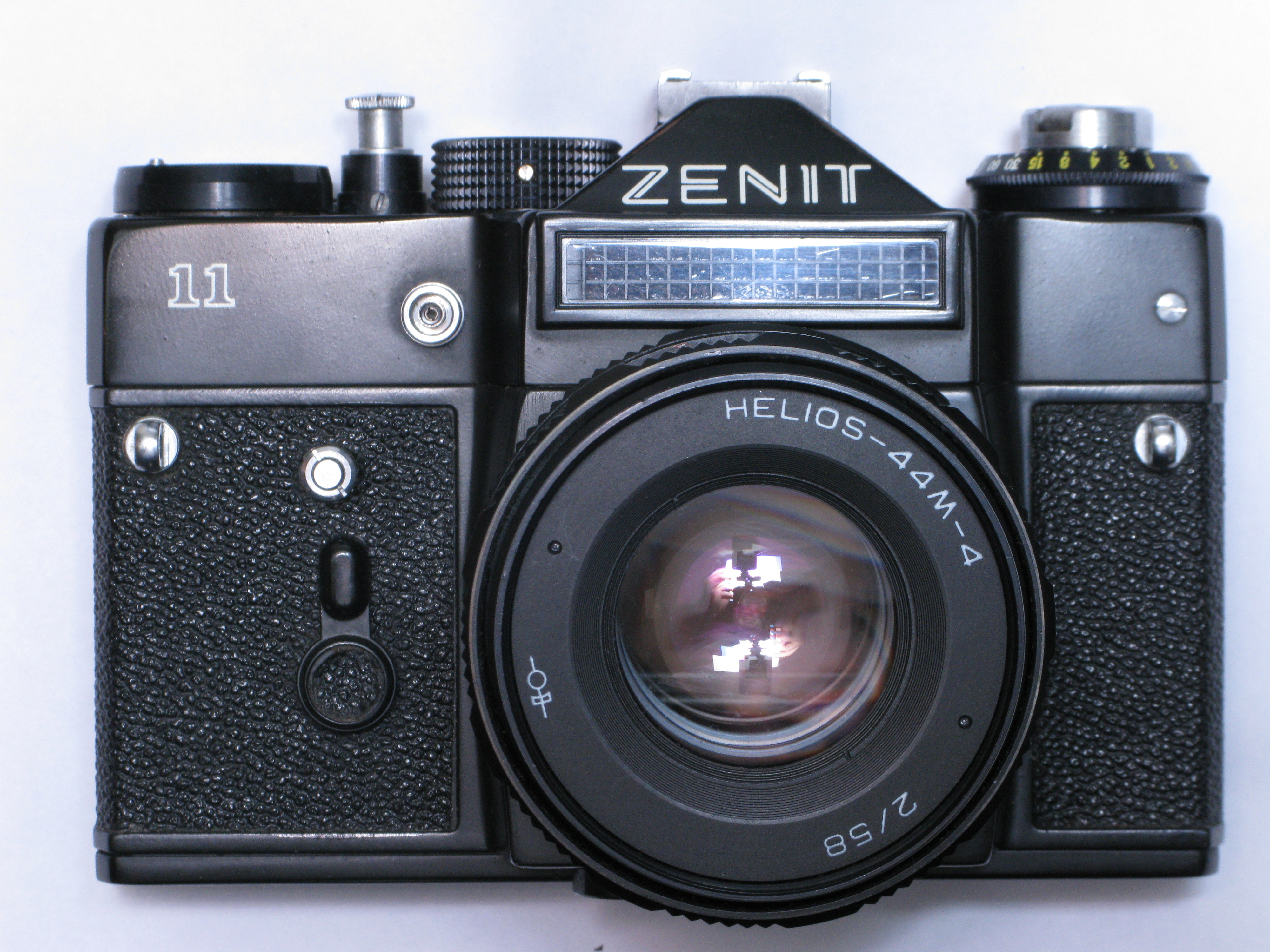 Zenit 11 y Helios 58mm f2 montura rosca M42